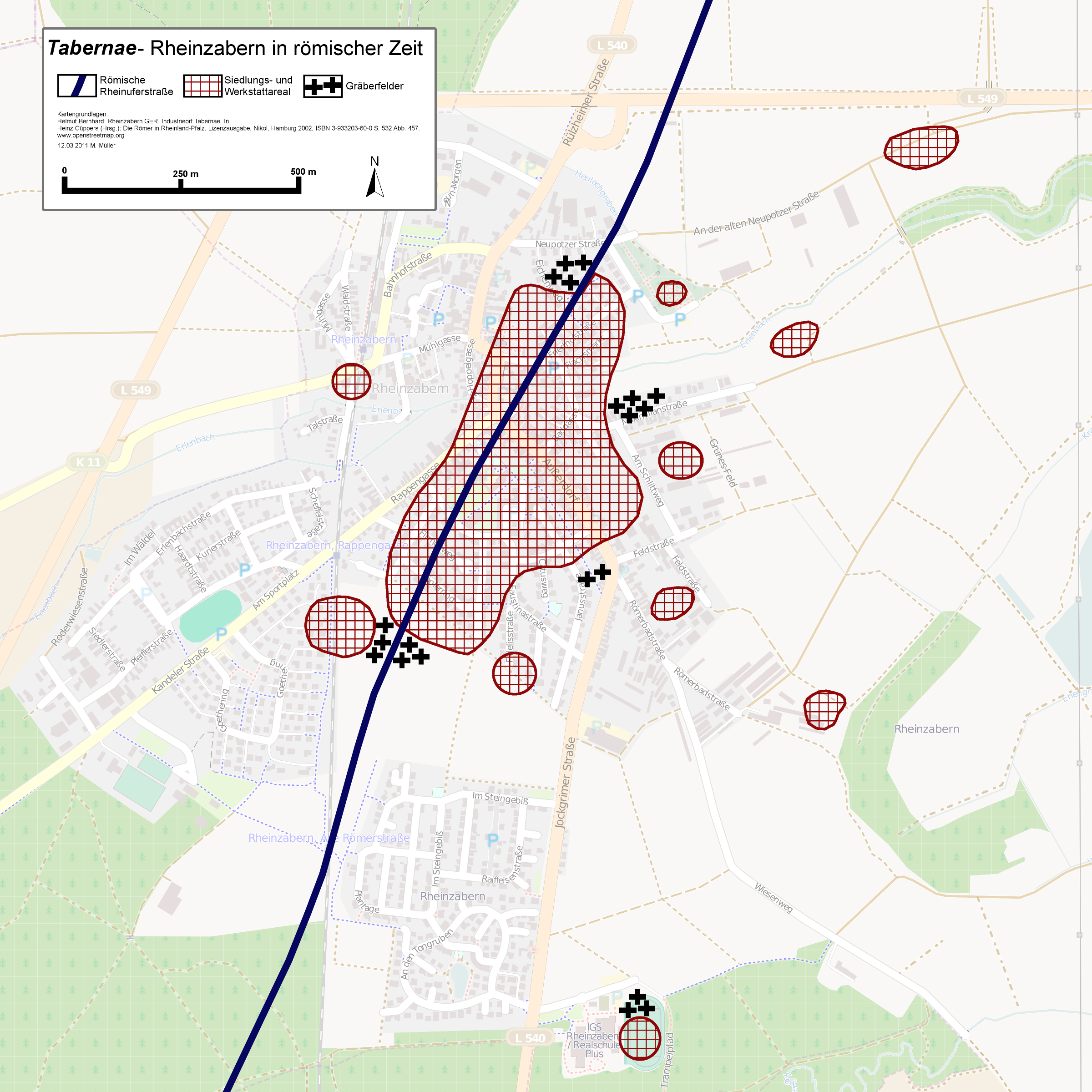 Rheinzabern].